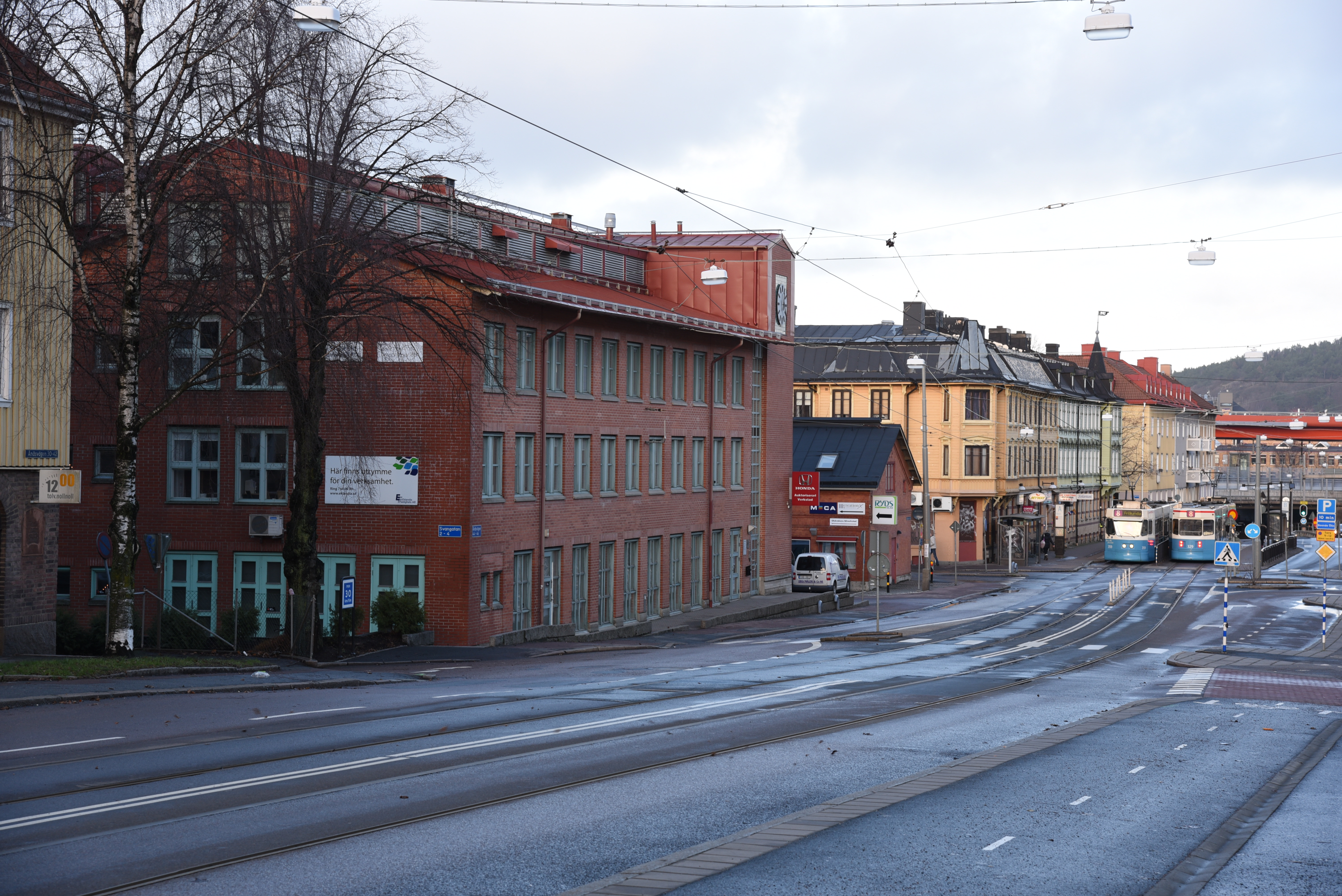 Ånäsvägen 48-56 i stadsdelen Olskroken i Göteborg.